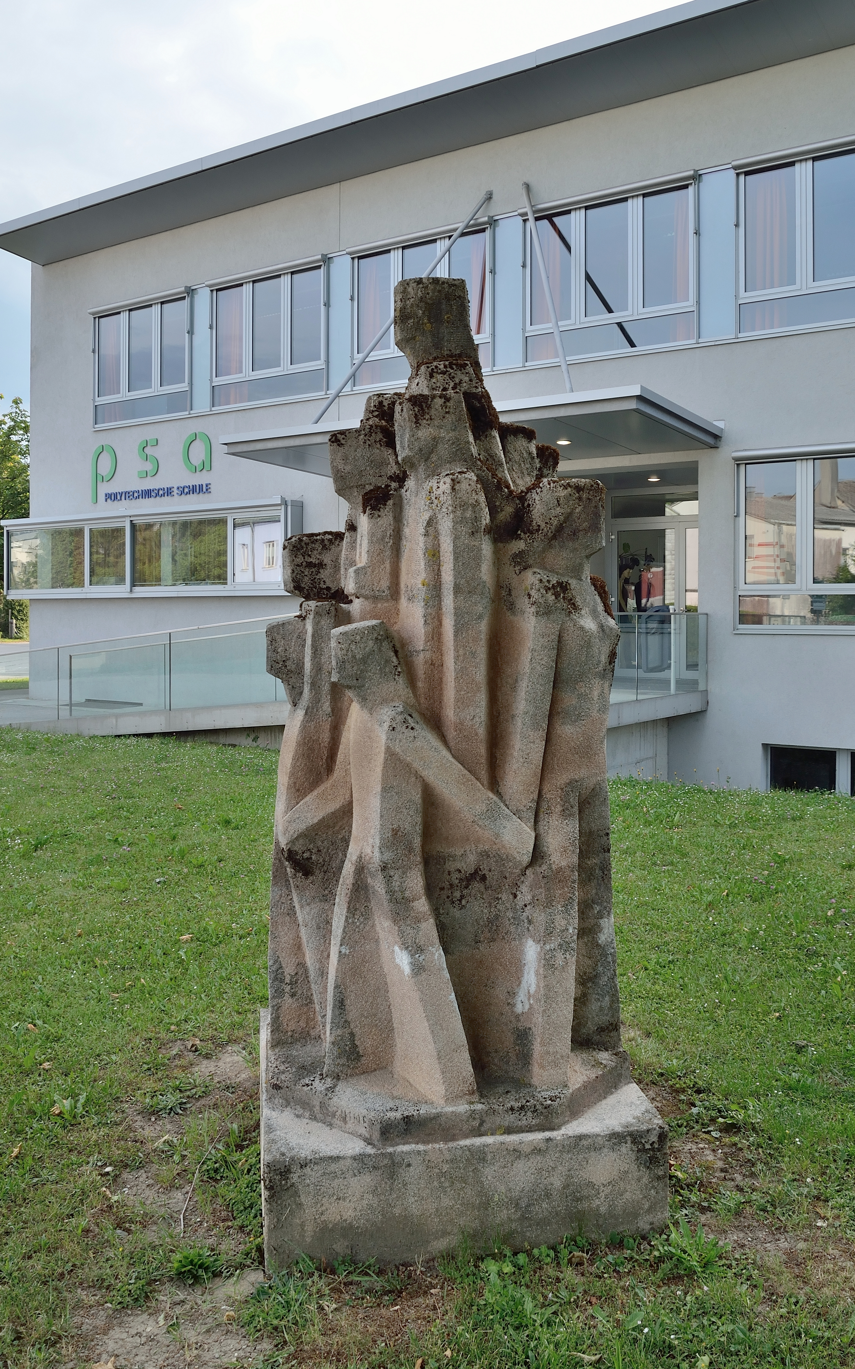 Skulptur von Kunibert Zinner vor der Polytechnischen Schule in der Siedlungsstraße in Amstetten.